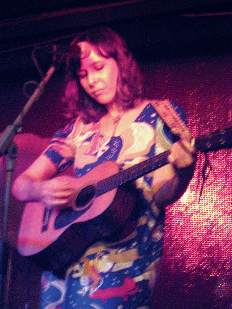 Eleni Mandell im Privatclub, Berlin.